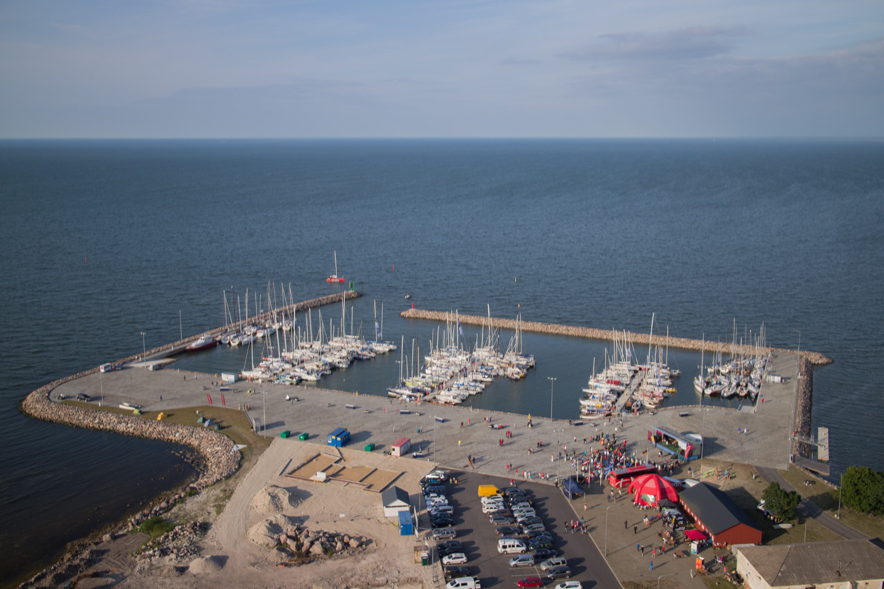 Muhu Väina Regatt Kärdla sadamas